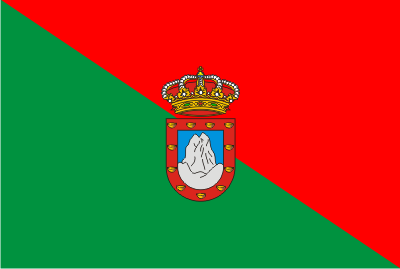 Bandera de Vallehermoso (Santa Cruz de Tenerife, España)